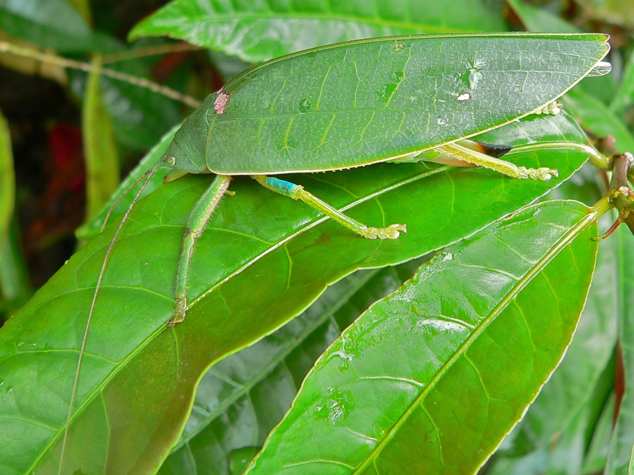 Khao Yai NP, THAILAND